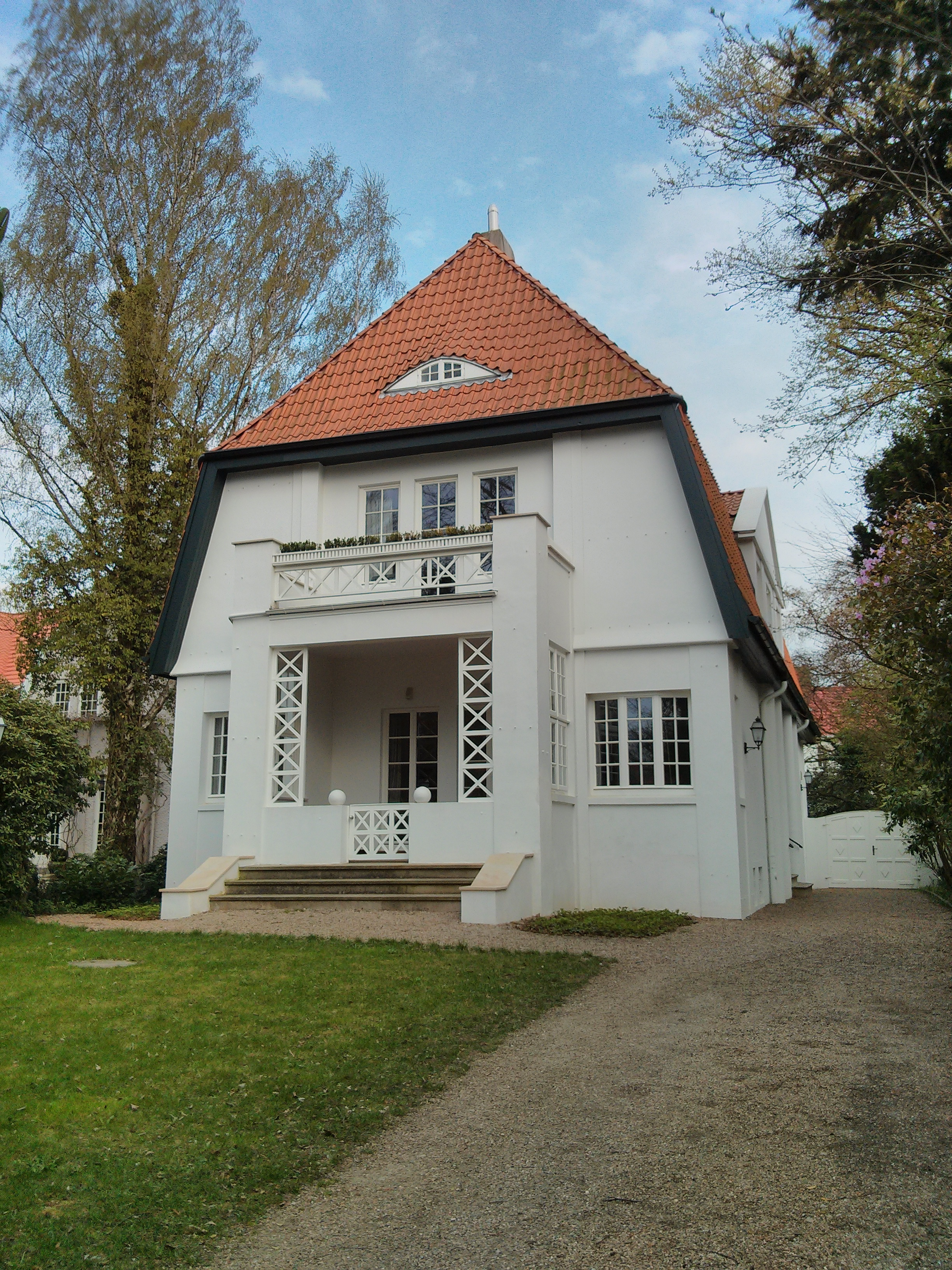 Landhaus Herbst in Bremen, Schwachhauser Heerstraße 335Das abgebildete Objekt ist ein geschütztes Kulturdenkmal in der Freien Hansestadt Bremen, mit der Nr. 1132 beim Landesamt für Denkmalpflege registriert.